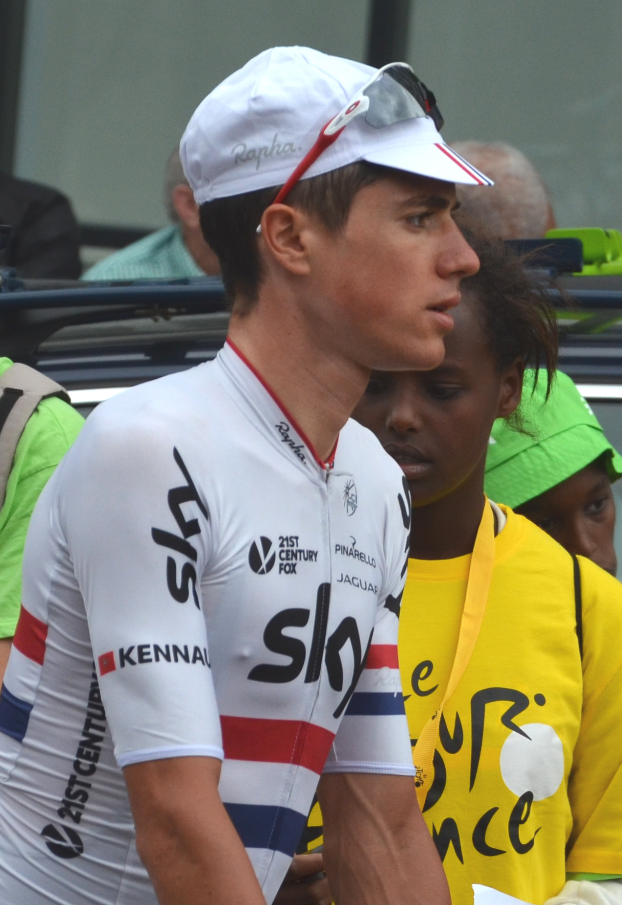 Peter Kenaugh au départ de la 8ème étape du Tour de France 2015, à Rennes.